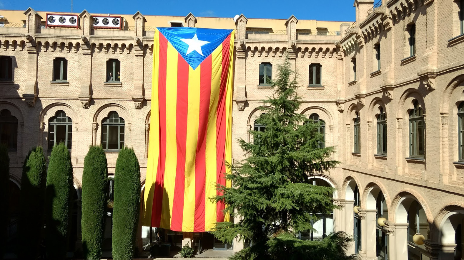 Mobilitzacions, en favor del referèndum de l'1 d'octubre del 2017 per la independència de Catalunya, al Claustre de la Pensativa de la Universitat de Lleida.